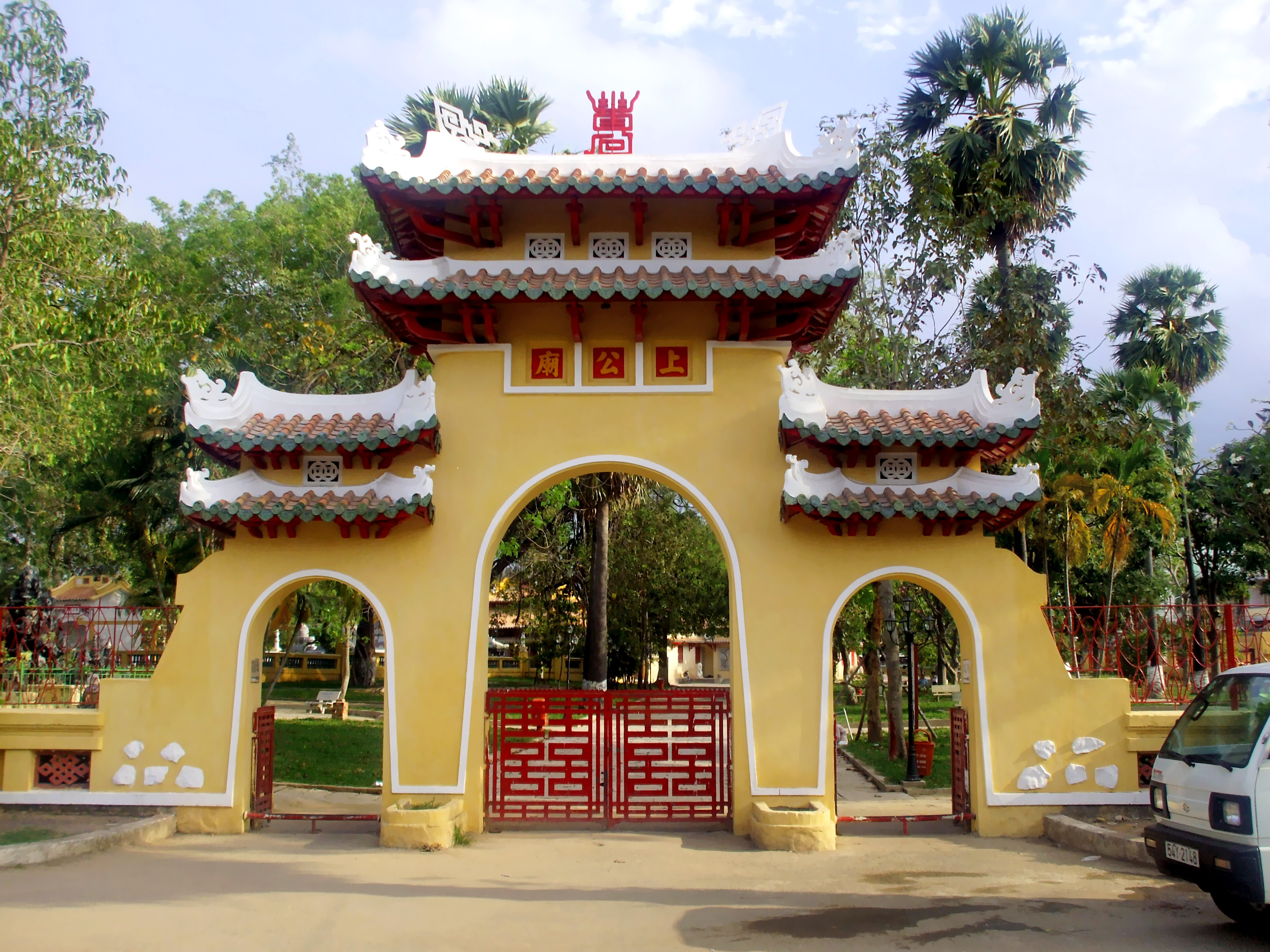 Cổng chính Lăng Ông Bà Chiểu, nay thuộc quận Bình Thạnh, TP. Hồ Chí Minh.